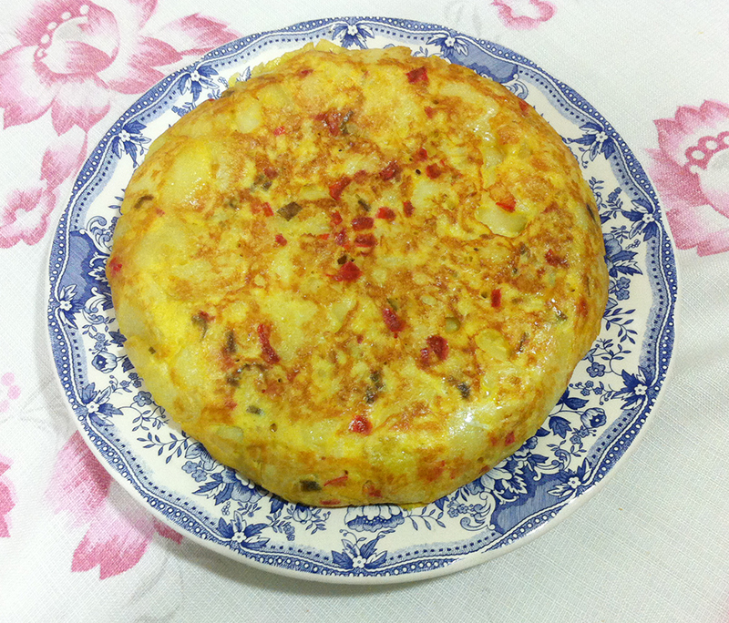 Tortilla española